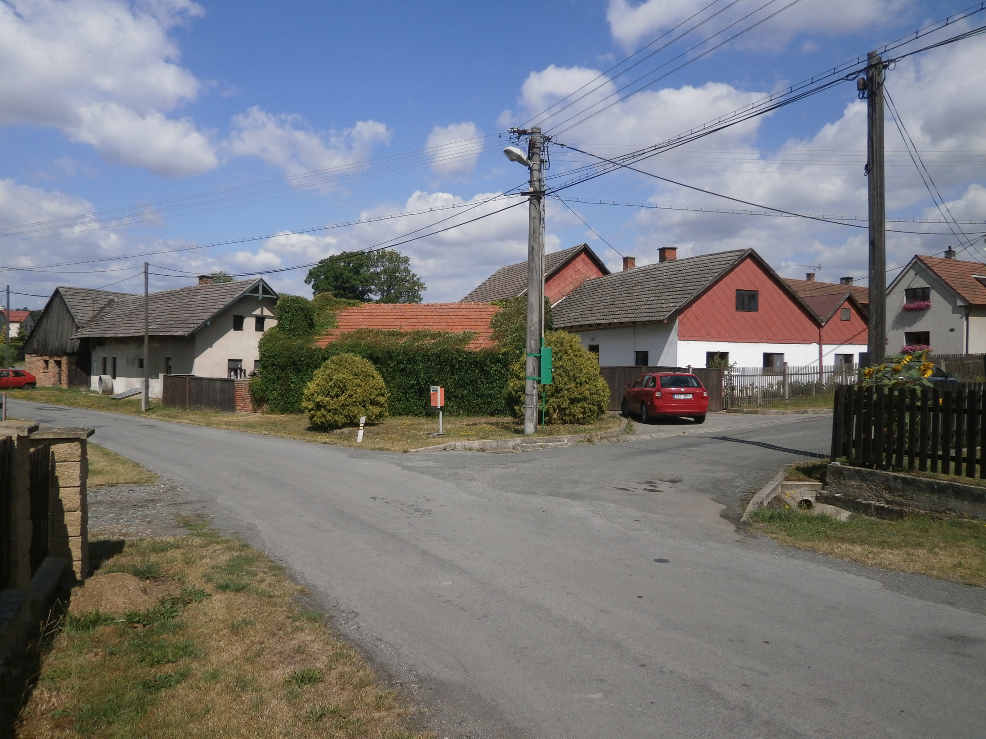 Obora - střed obce